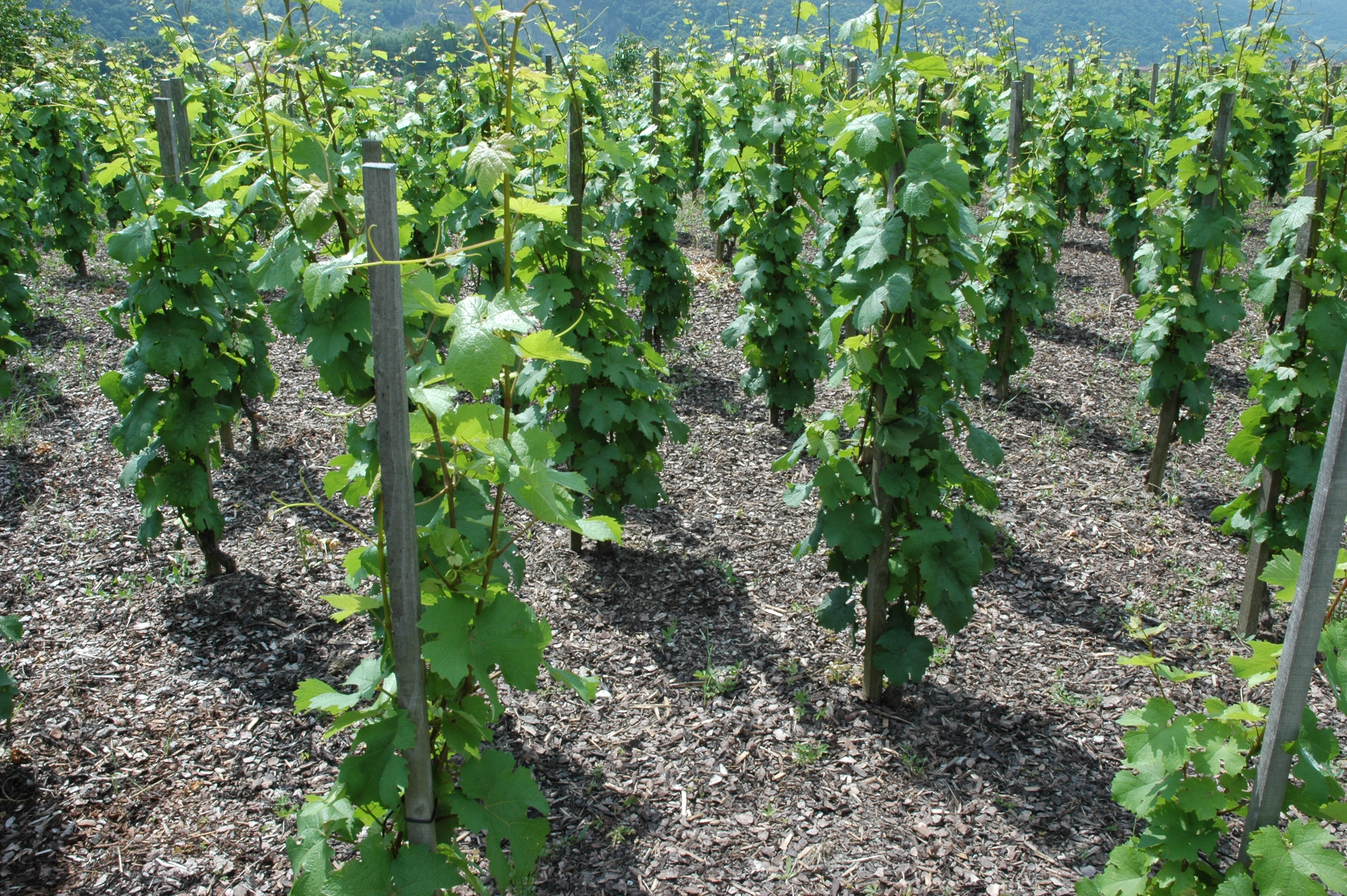 Musteranlage einer Stockkultur, eine Einzelpfahlerziehung in Weißenkirchen in der Wachau